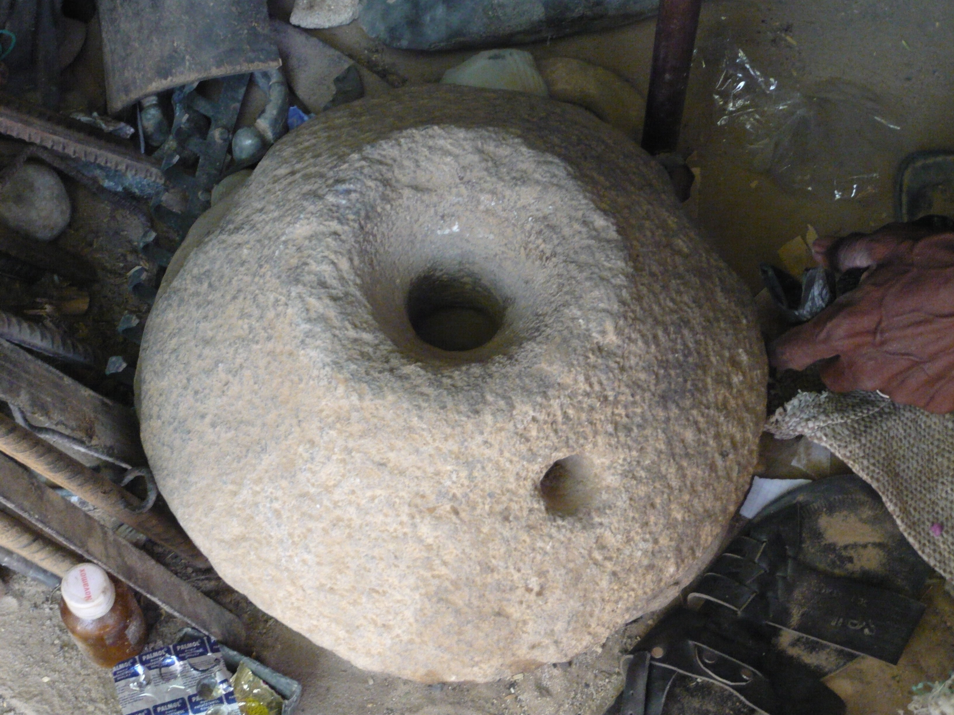 Moulin préhistorique découvert près de Bamba (Mali)